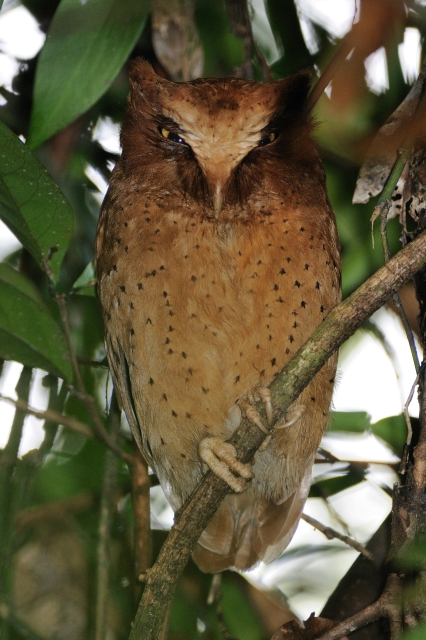 Serendib-Zwergohreule